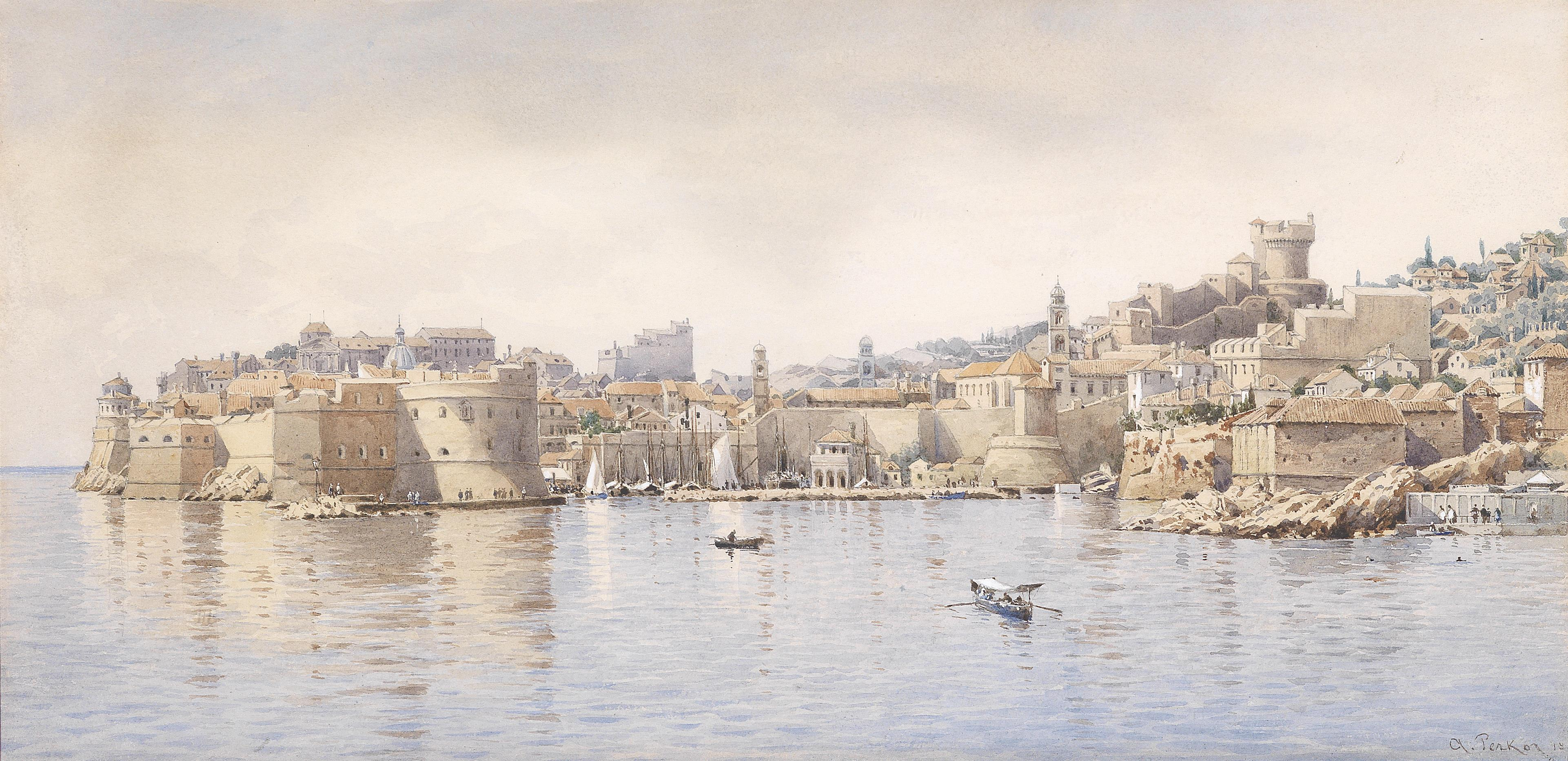 Blick auf Ragusa (Dubrovnik) vom Meer aus